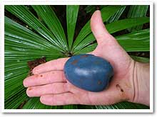 “カサワリ・フルーツ”。.